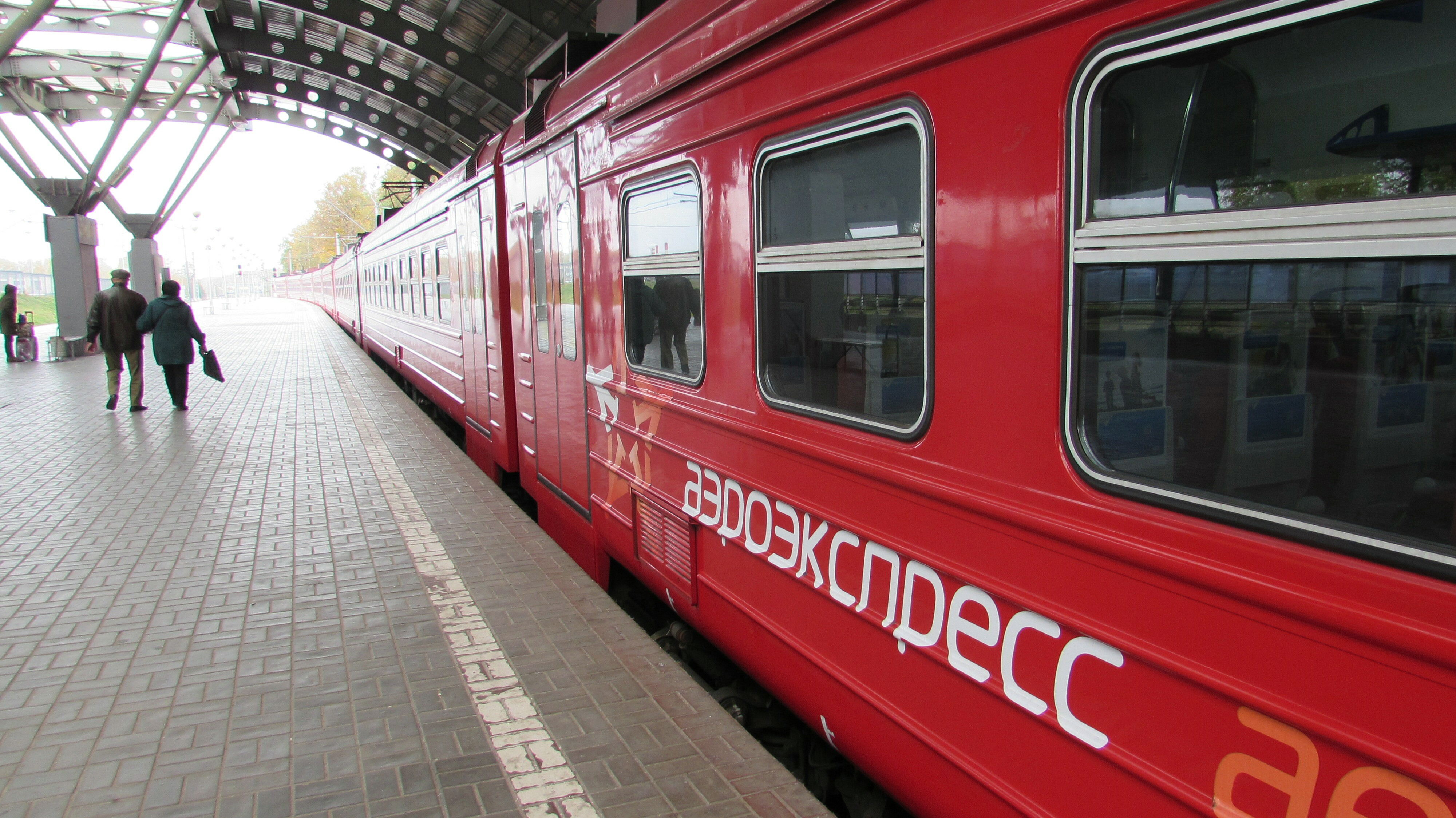 Moskau Domodedowo Aero Express